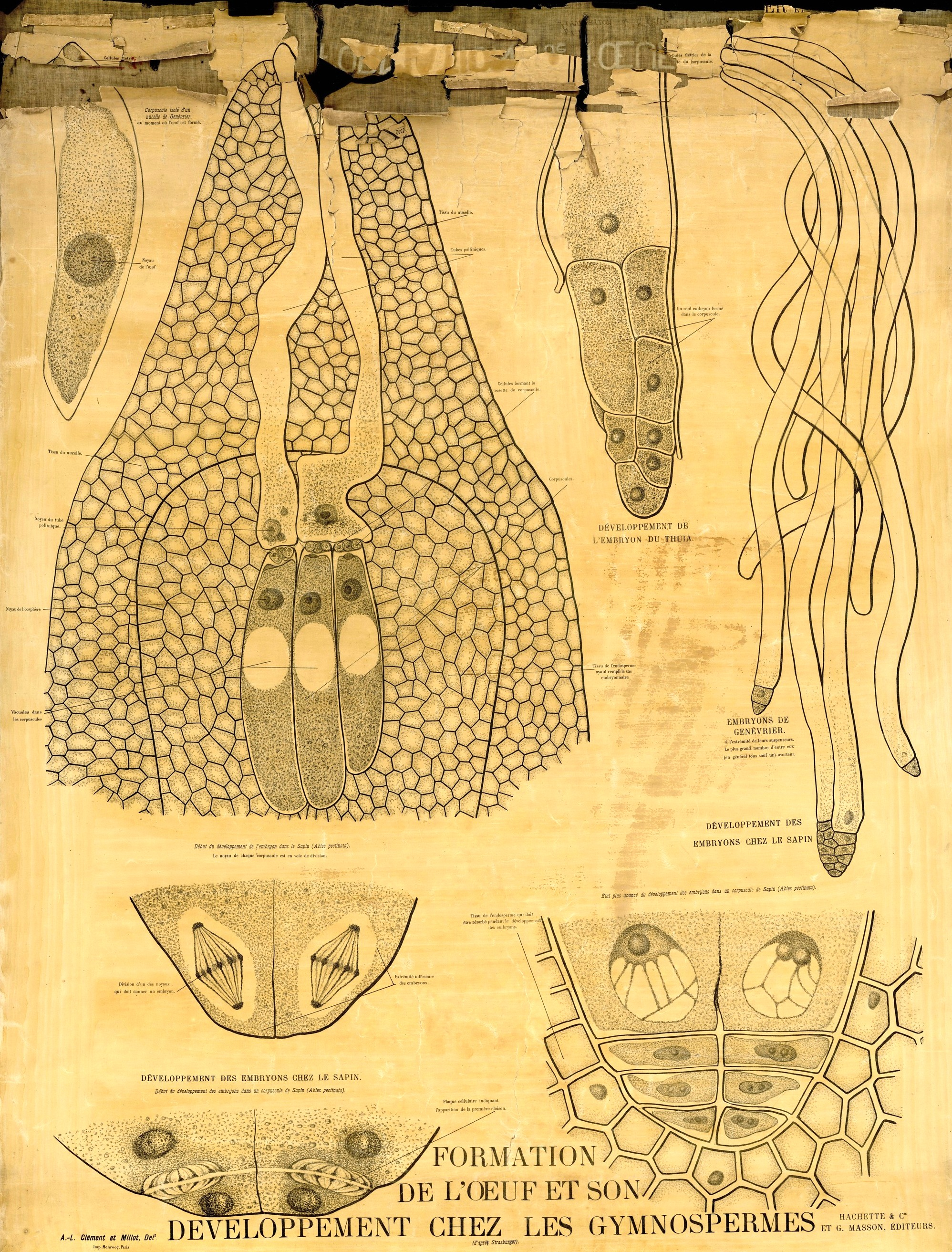 Formation de l'oeuf et son développement chez les gymnospermes. Bibliothèque Numérique de l'Université d'Artois. Retrieved on 25 March 2016.